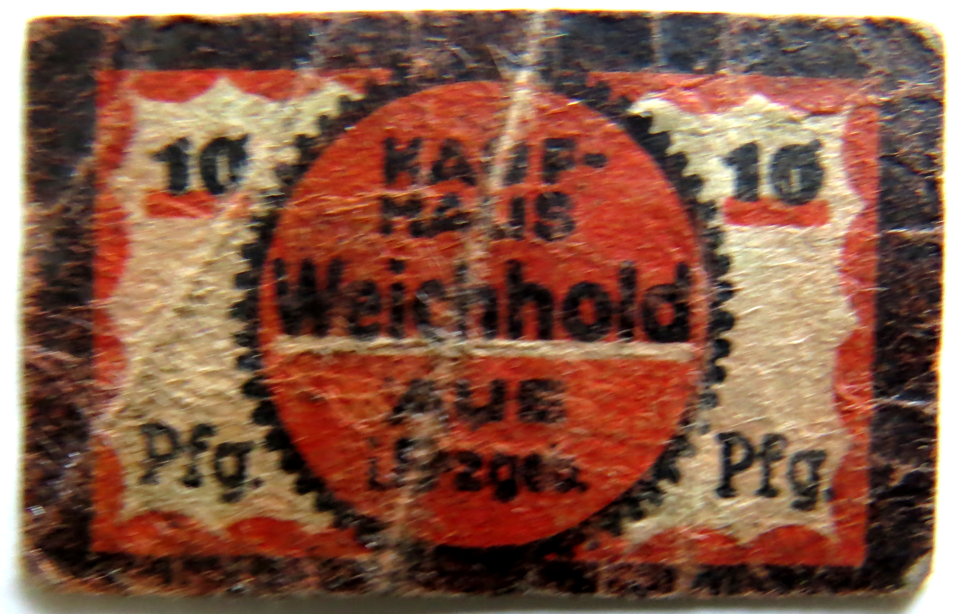 Aue in Sachsen, Bahnhofstraße, Kaufhaus Weichhold: Notgroschen 1918